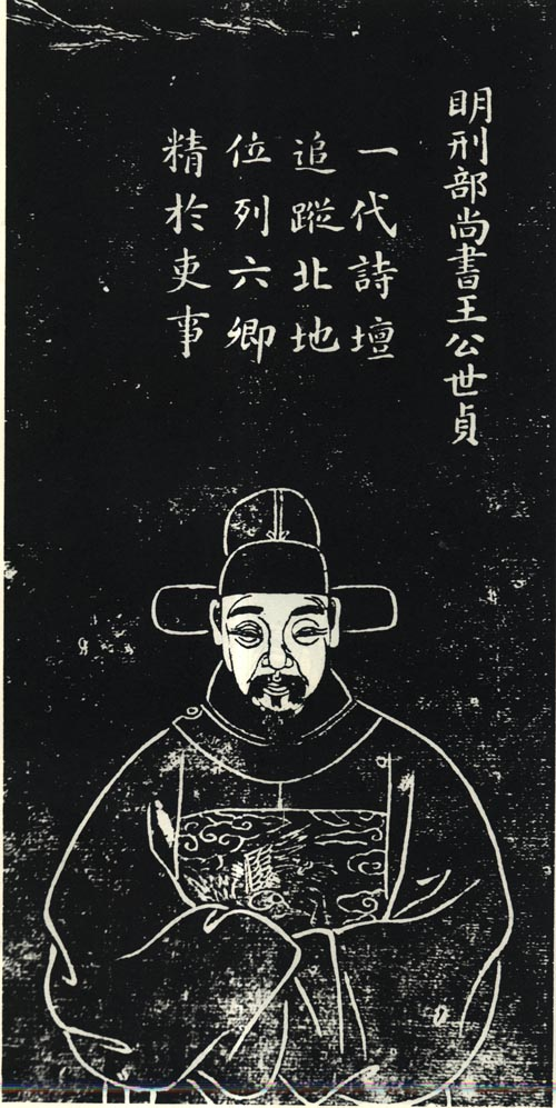 王世貞（1526年－1590年），字元美，號鳳洲，又號弇州山人，直隸太倉州（今江蘇太倉）人，明朝政治人物、文學家、史學家。「後七子」之一。官至南京刑部尚書。